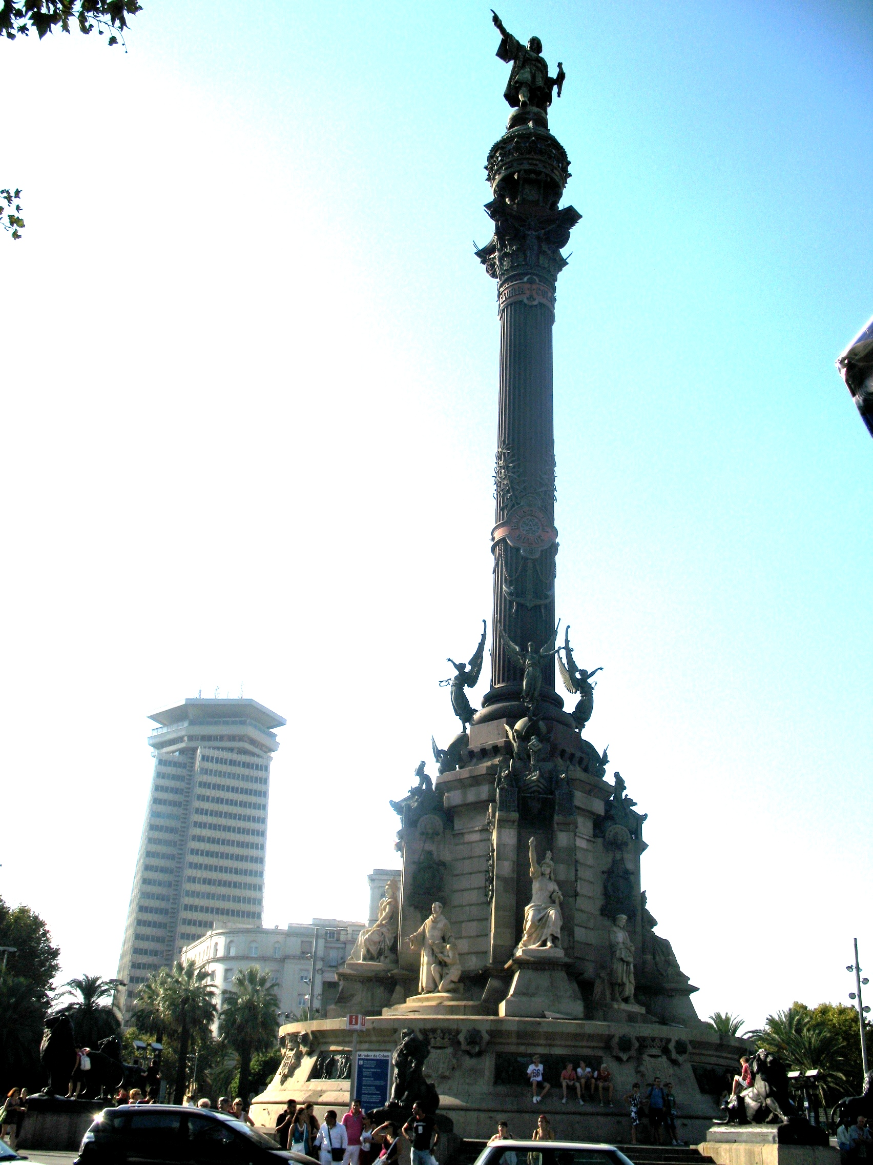 Памятник Х. Колумбу в Барселоне (Испания)